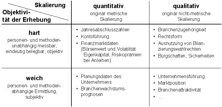 Klassifizierung von Datenquellen für Insolvenzprognosemodelle anhand der Kriterien Objektivität der Erhebung und Skalierung; in Anlehnung an FISCHER (2004, S. 83)